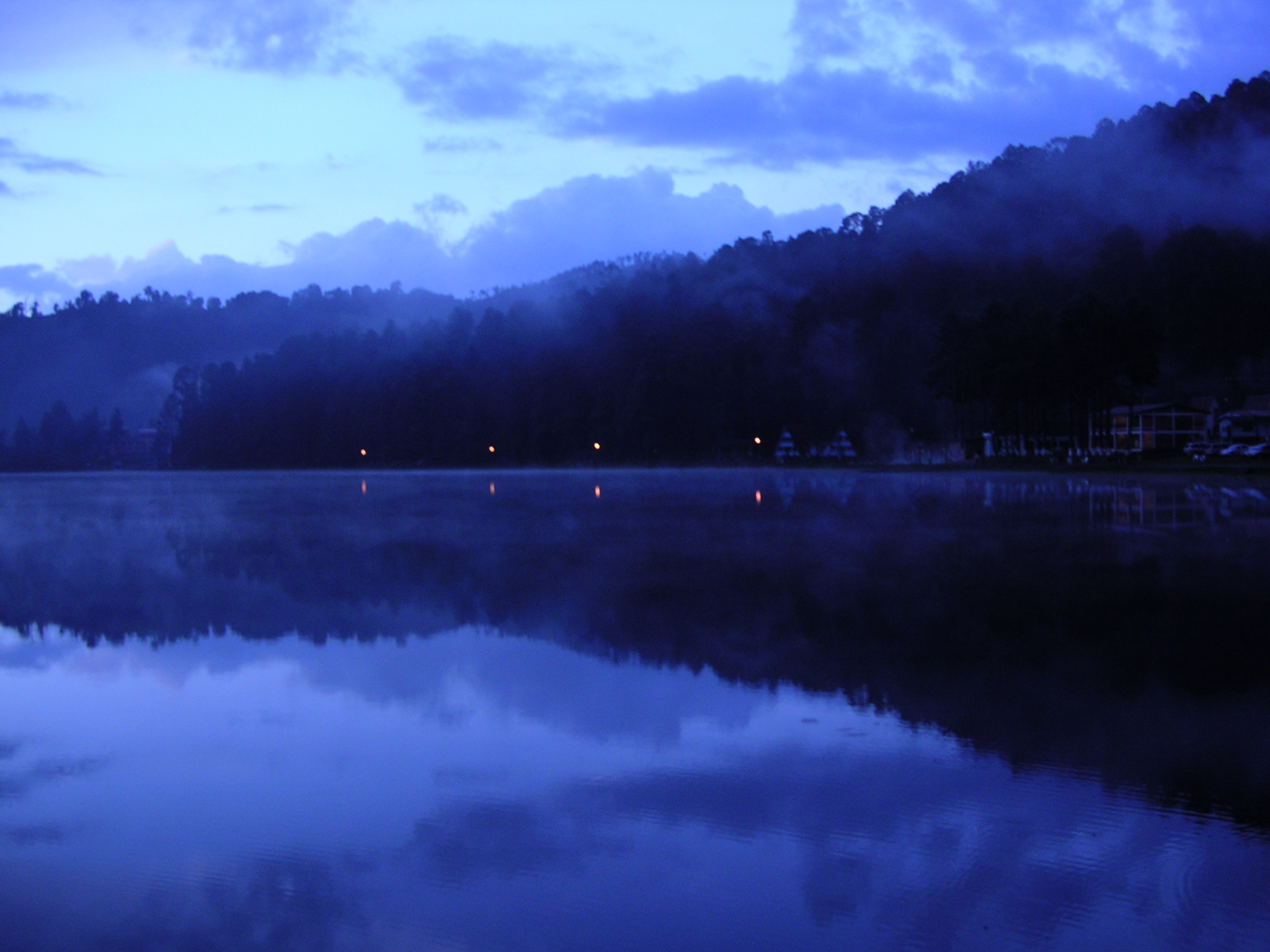 Laguna larga México los Azufres